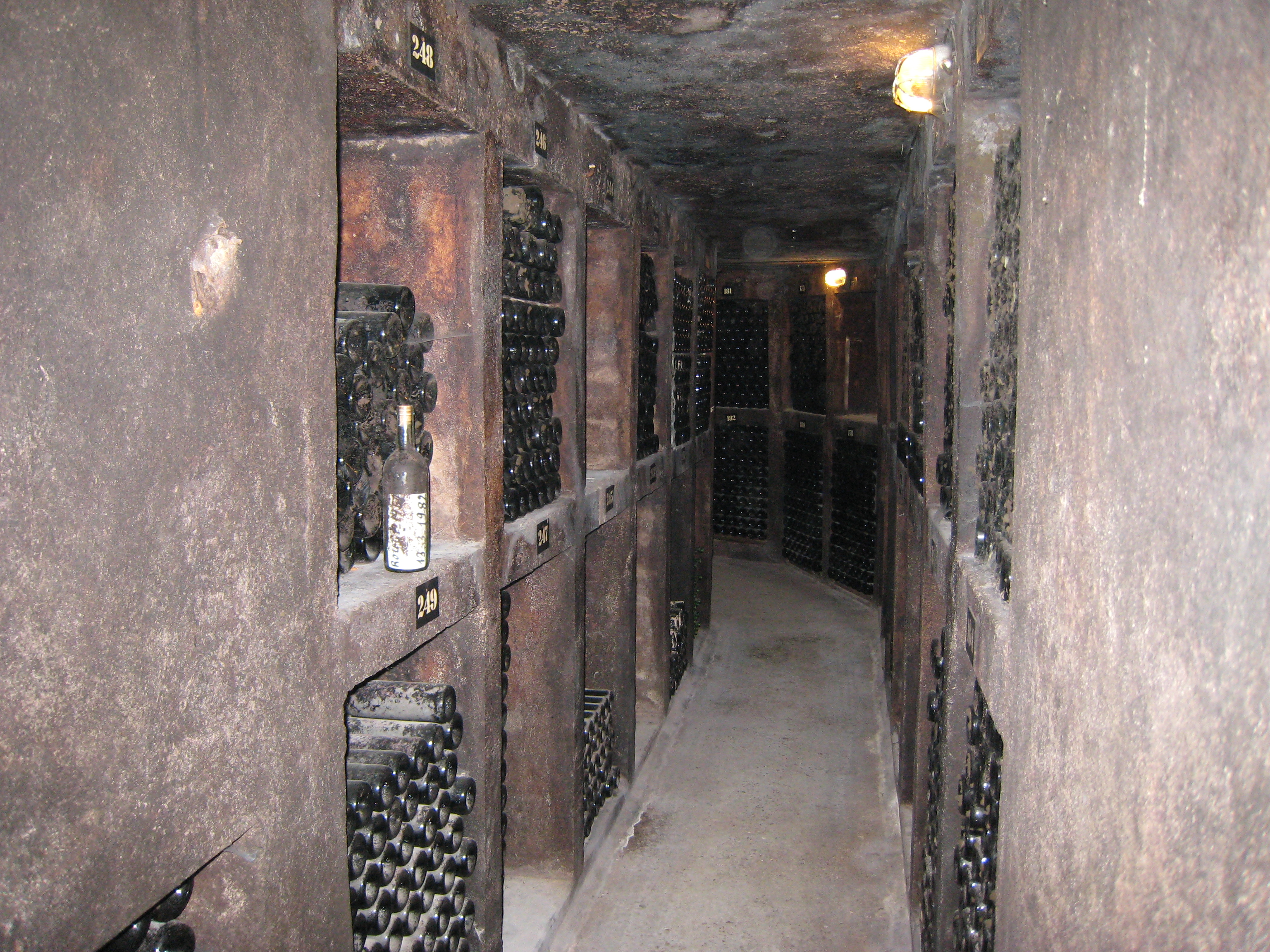 Ksara (Liban) : les vieilles bouteilles